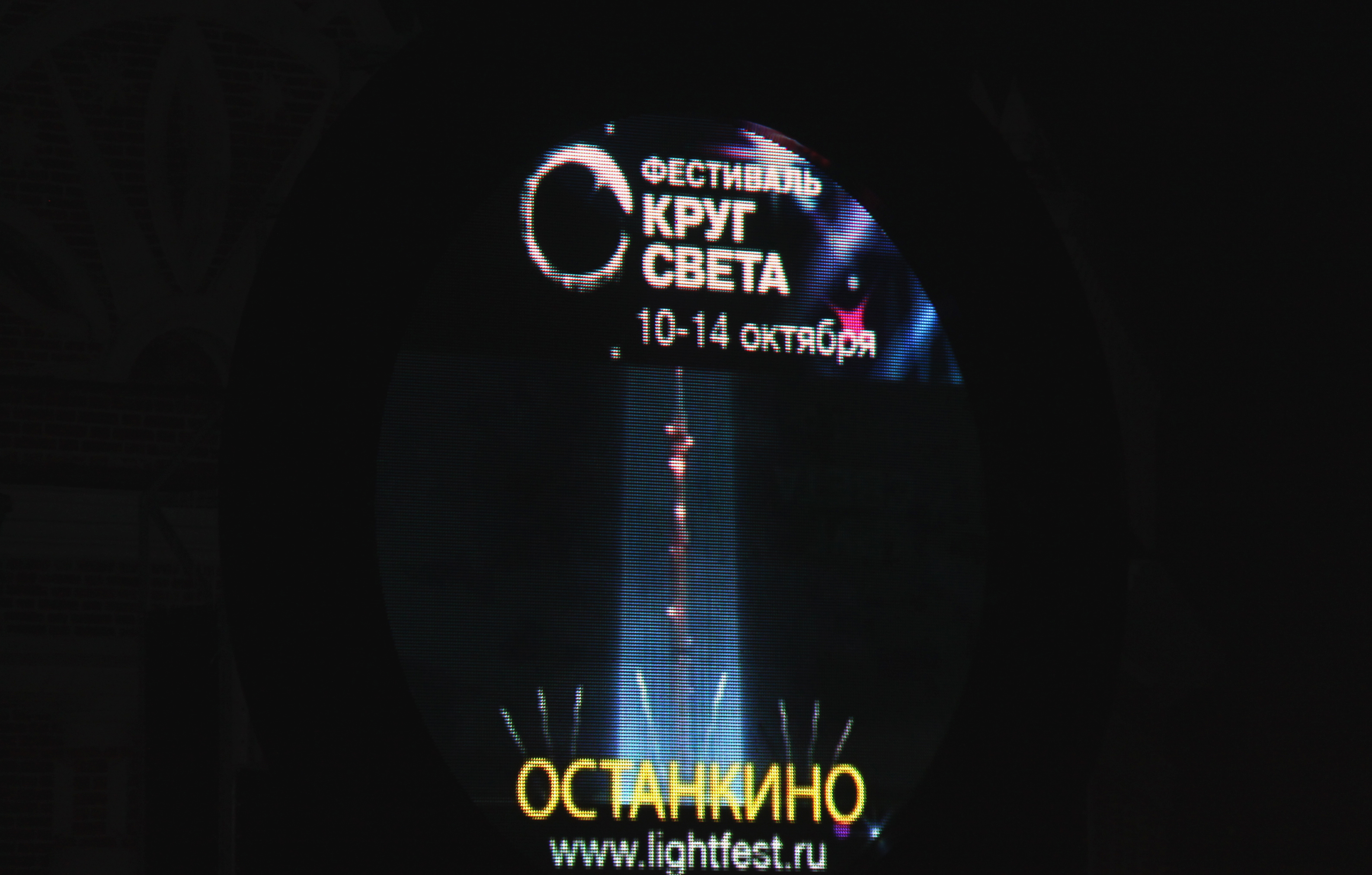 Московский международный фестиваль «Круг Света» в Царицыно.